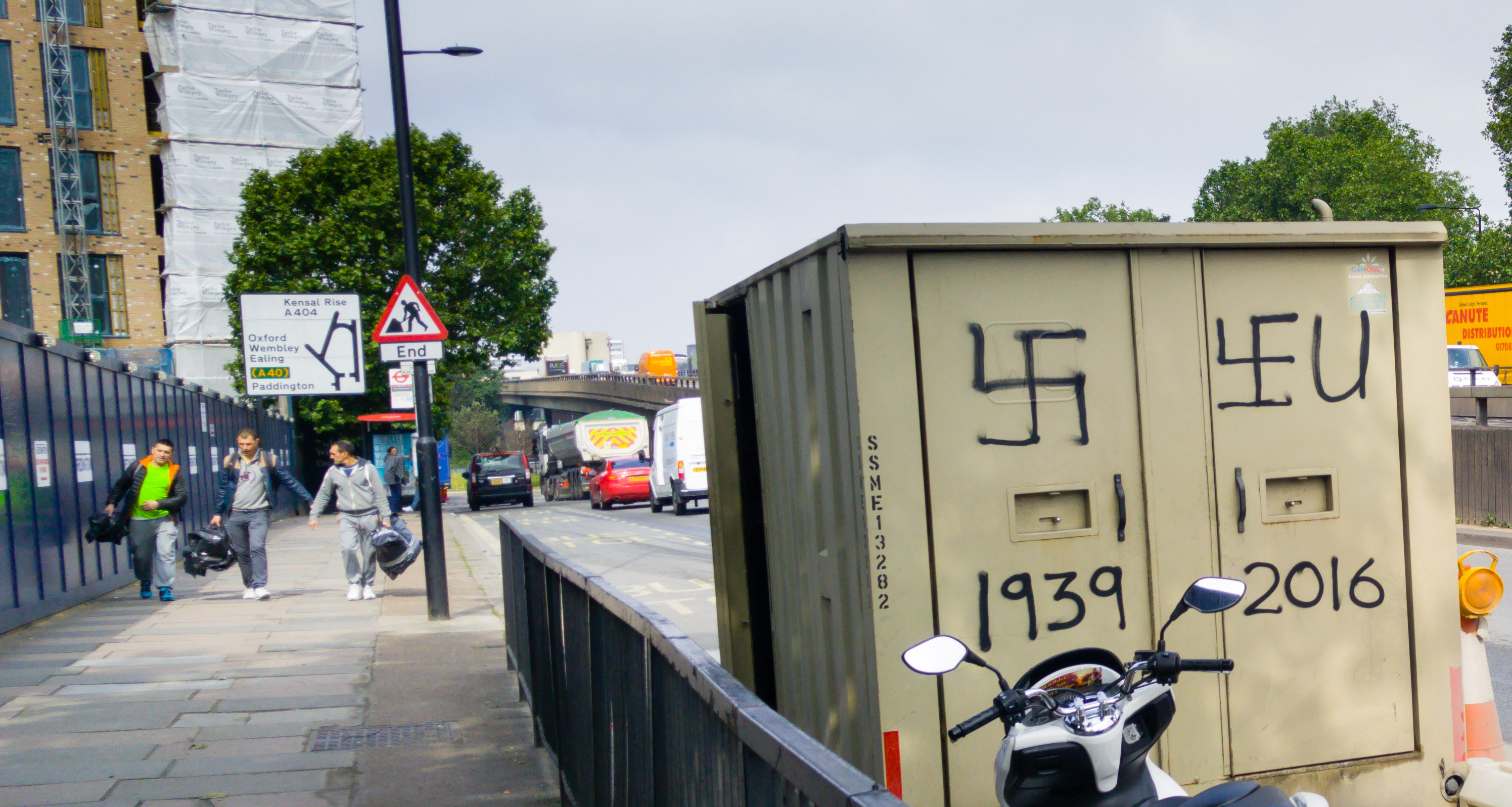 brexit graffiti